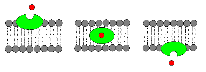 Mechanizm działania jonoforów